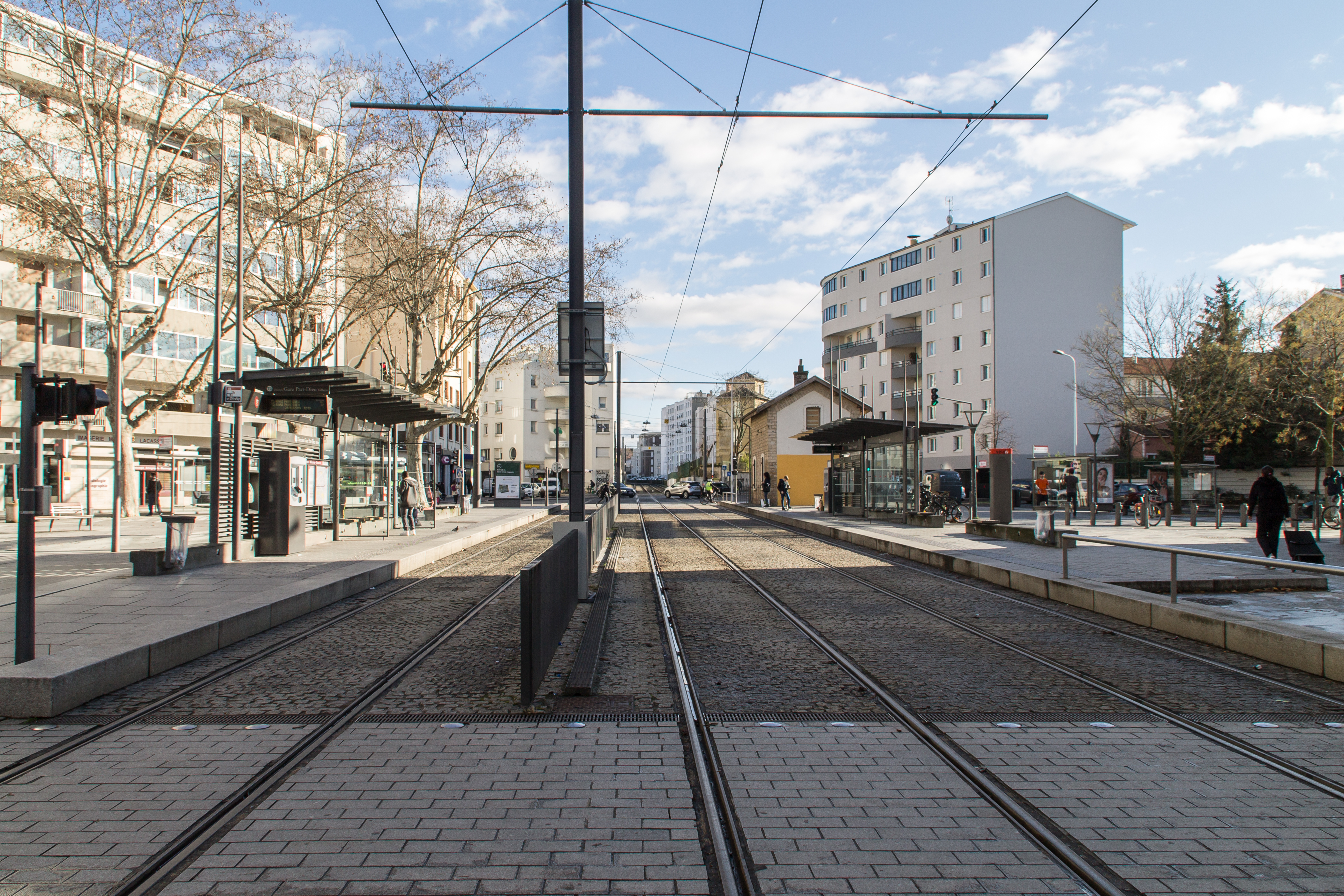 Vue de la station de tramway Dauphiné Lacassagne sur la ligne T3 dans le 3e arrondissement de Lyon